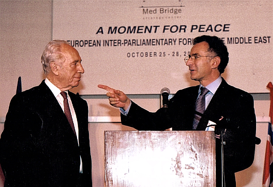 President Shimon Peres with Ambassador Zimeray in jerusalem, October 2003